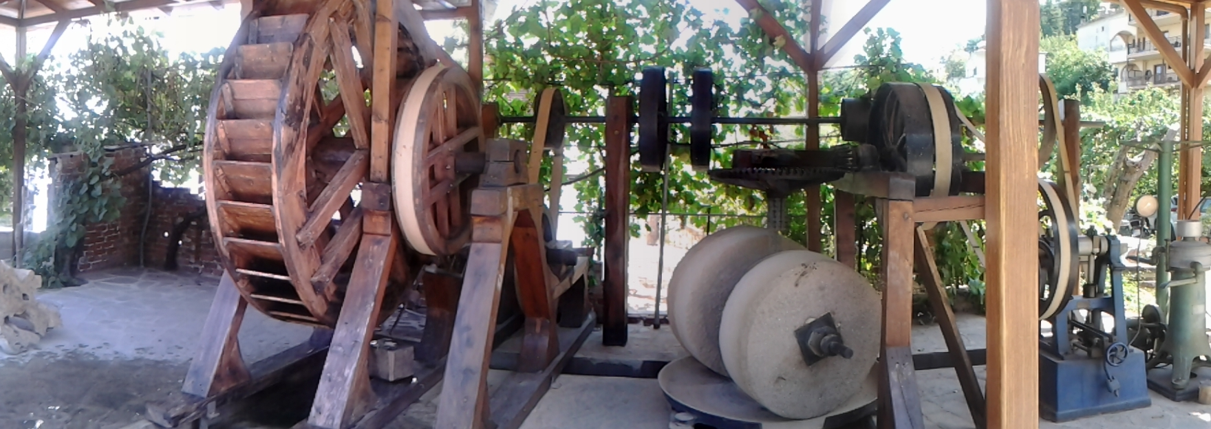 Драган Цветковић Ниш Сопствена слика 2013 Изложбена поставка фабрике-воденице за цеђење маслиновог уља на острву Тасос место Панагија каква је била 1915. године Licensing